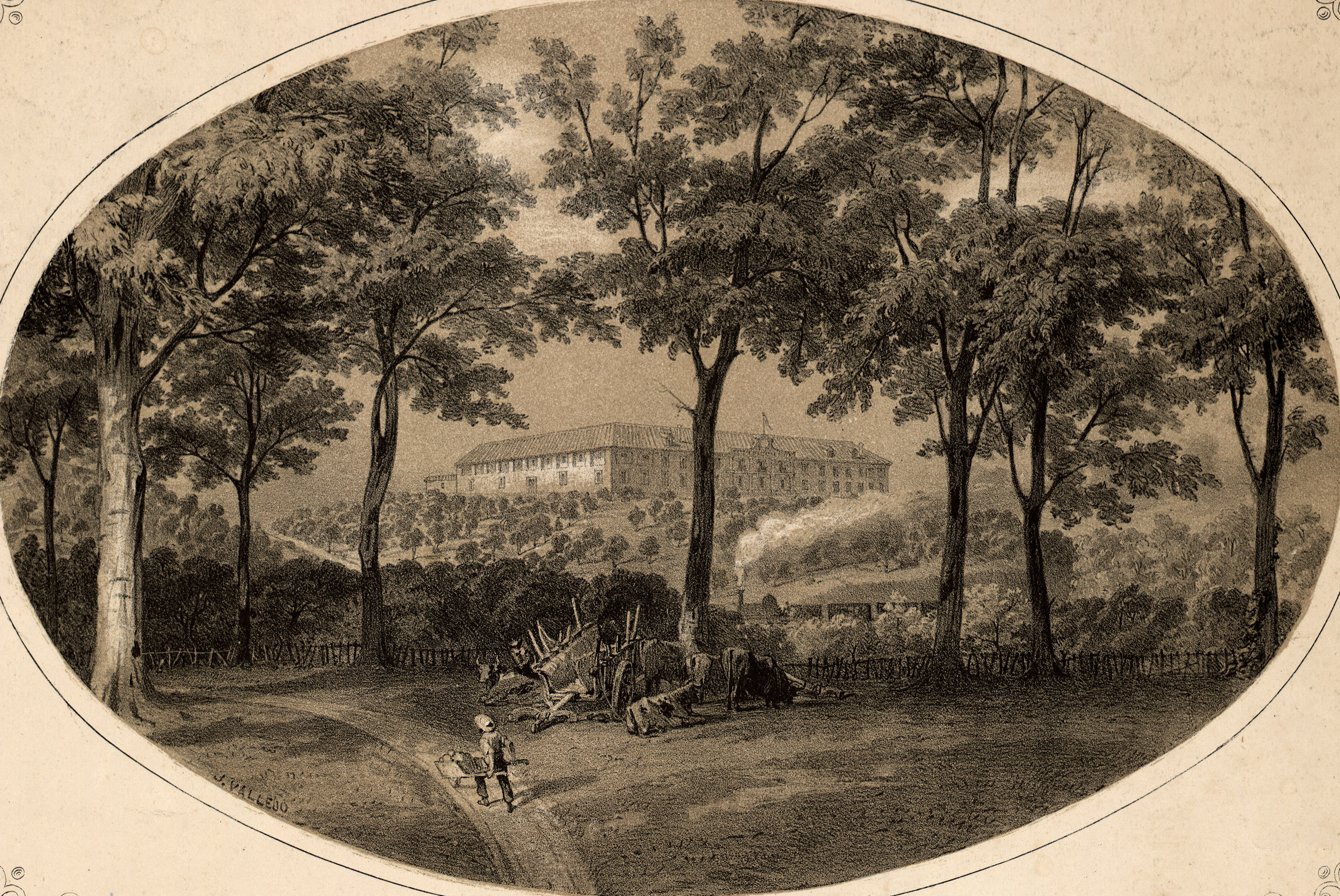 Vista de la Flamenca para establecimiento de la Escuela Central de Agricultura. Dibujado del natural por F. J. y Alarcón. J. Vallejo lit.°.